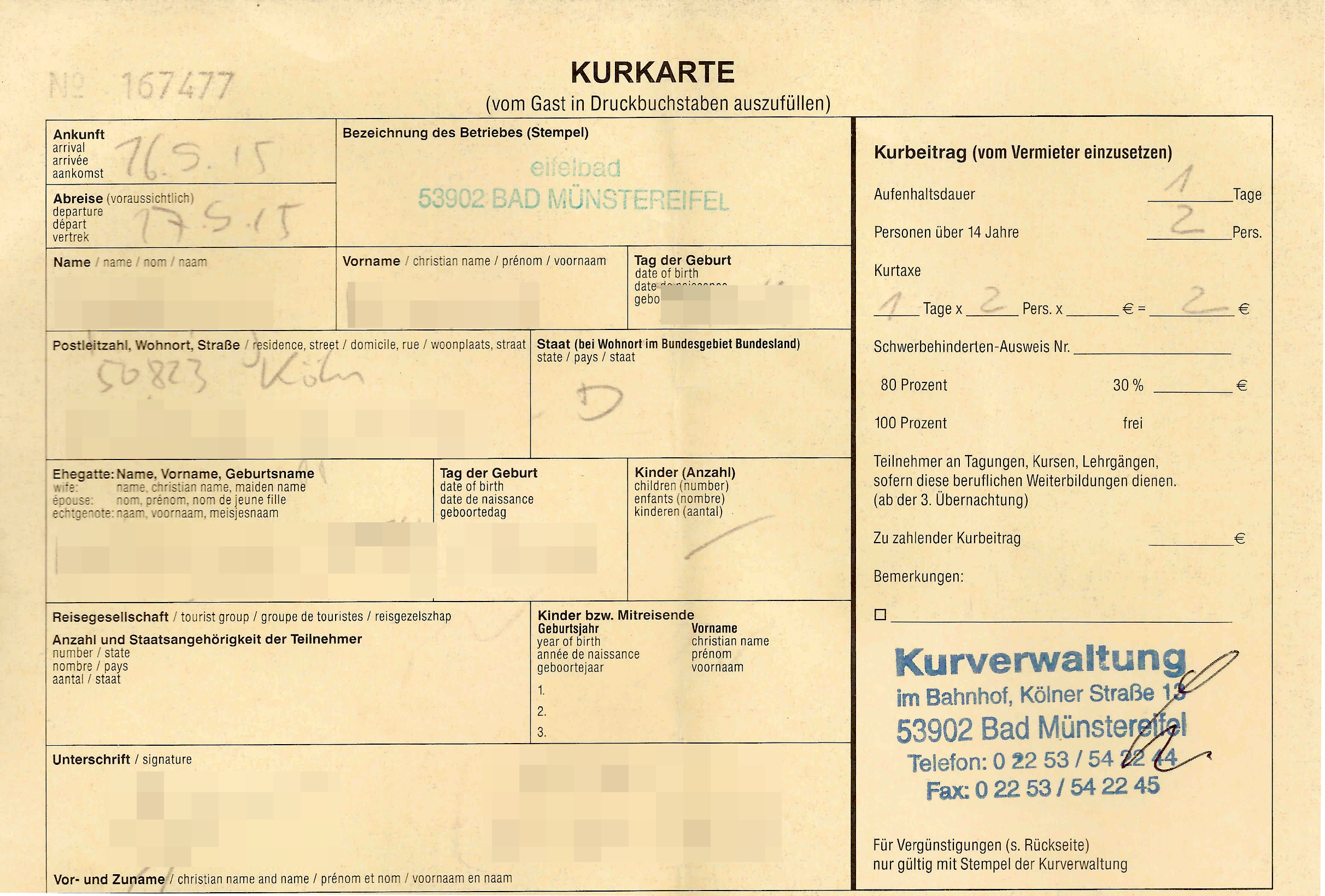 Kurkarte Bad Münstereifel, ausgegeben vom EIfelbad Bad Münstereifel für eine Übernachtung auf dem Wohnmobilstellplatz